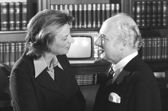 Walter und Mildred Scheel vor Bücherwand